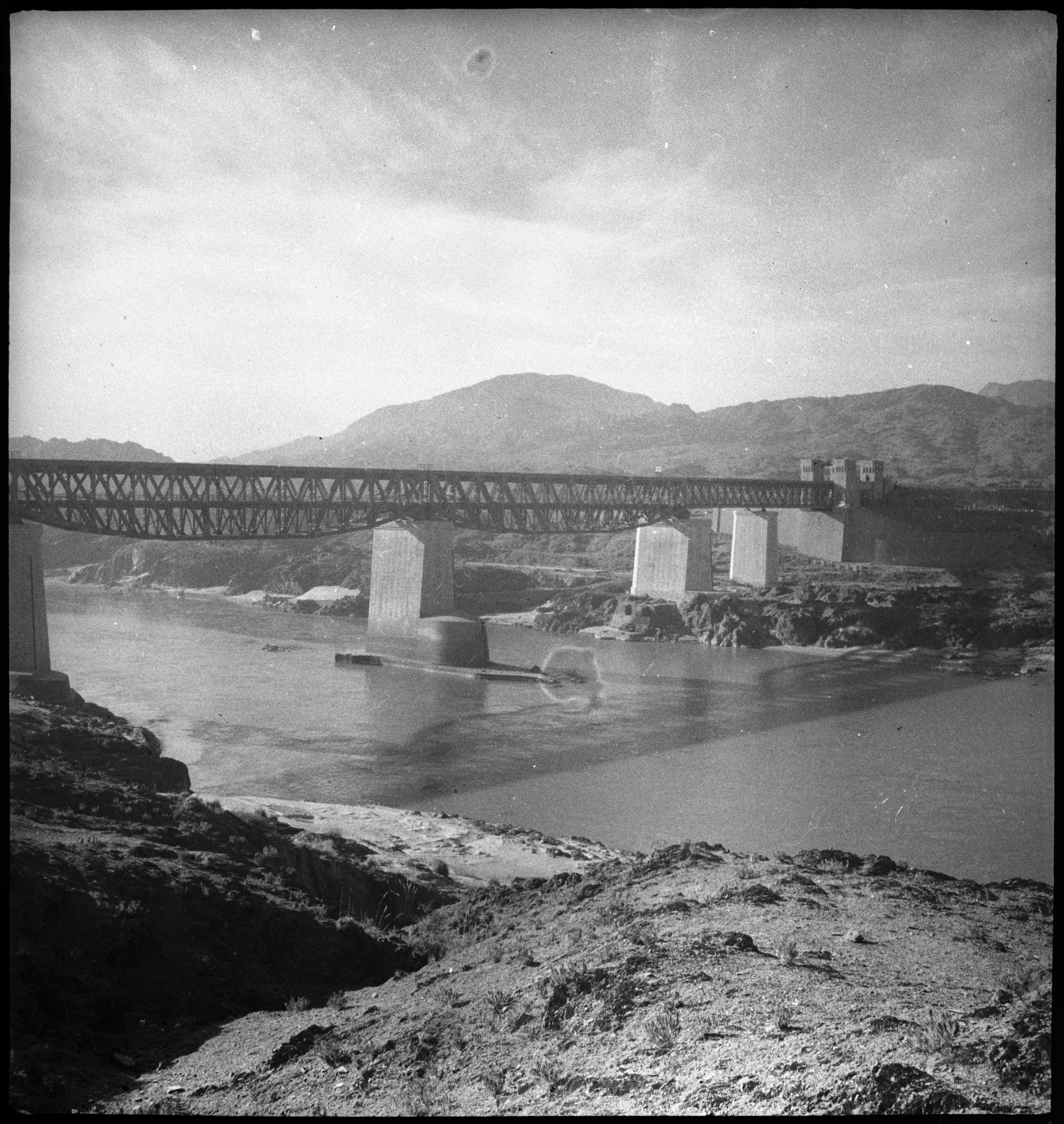 Britisch-Indien, Attock: Landschaft; Eine Eisenbrücke auf Betonpfählen über einen breiten Fluss